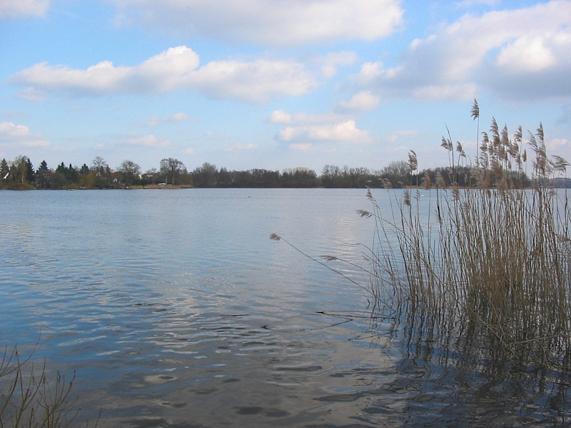 Ostorfer See in Schwerin, Germany